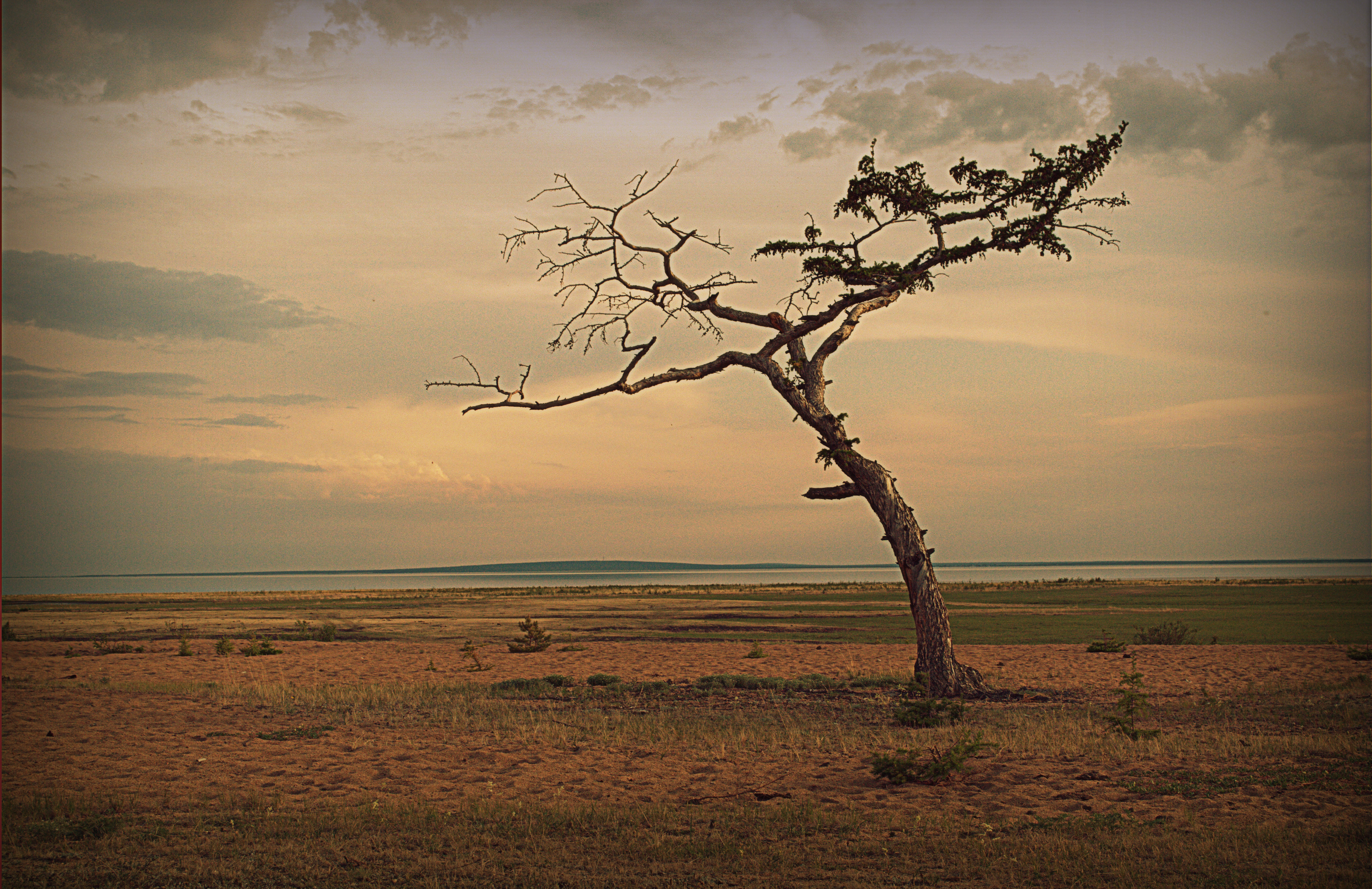 Деревце на берегу Большой Еравны (озера). Еравнинский район, Бурятия. Забайкалье